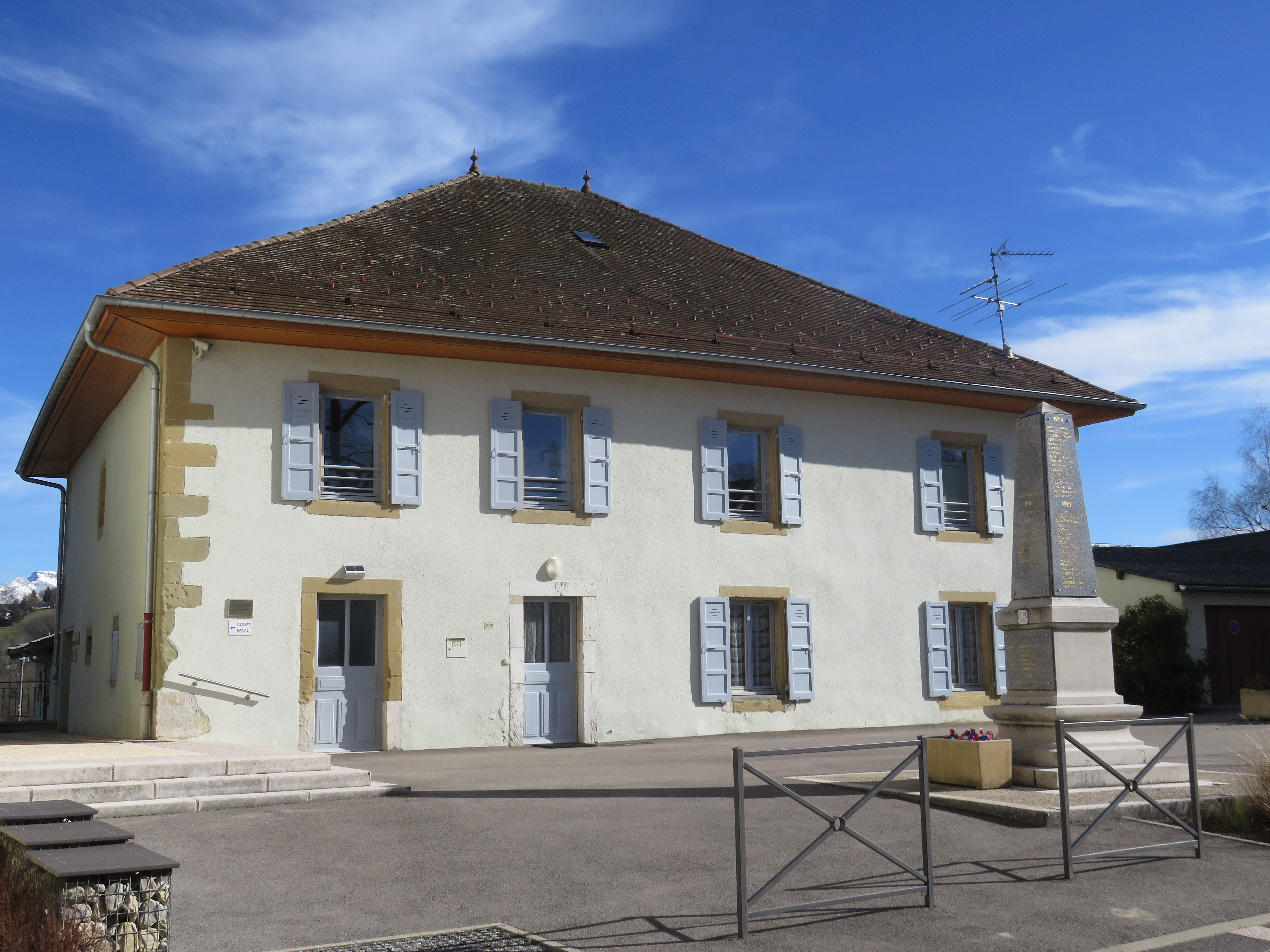 Le presbytère (Marcellaz-Albanais, France) le 23 février 2020.